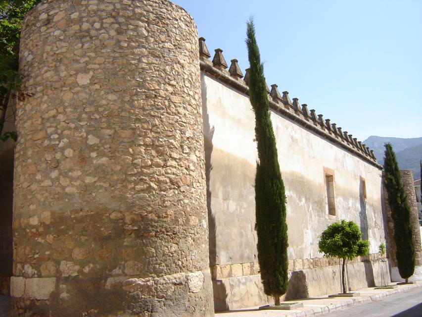 Castillo-palacio de los condes de El Padul (Granada, España)